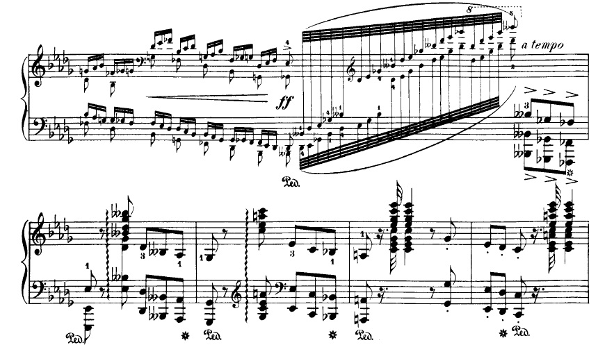 柴可夫斯基第1號鋼琴協奏曲第1樂章，第48至52小節